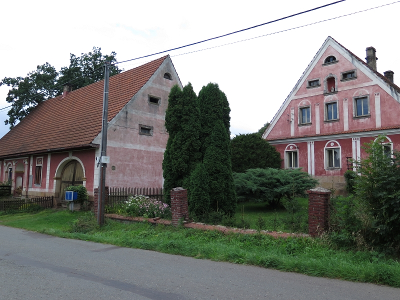 Usedlost čp. 39 a 38, Rožmitál 39 a 38, střed obce, u hlavní silnice, Rožmitál (Broumov).